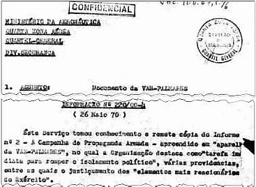 Documento do Ministério da Aeronáutica sobre a VAR-Palmares